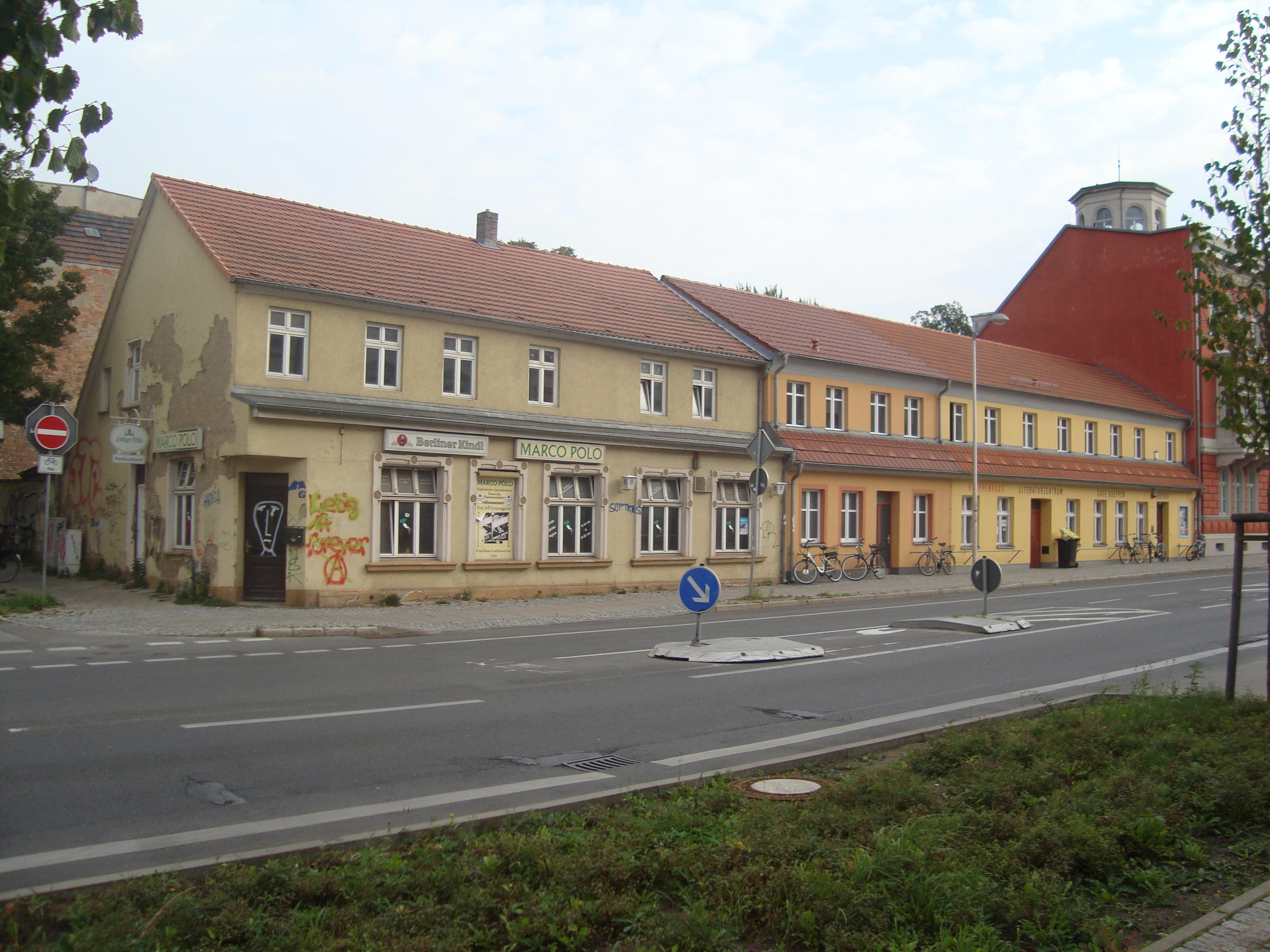 Budenreihe mit Koeppenhaus in der Bahnhofstraße 4-6 in Greifswald